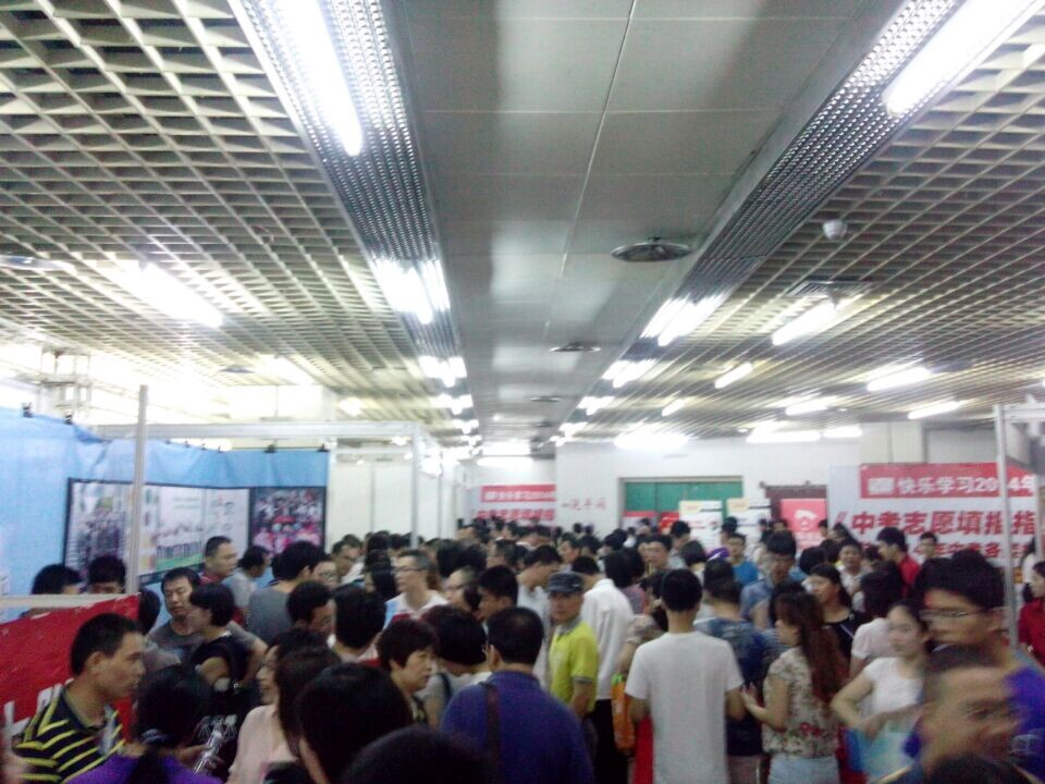 2014中招办咨询会室内景，于福建省工业品展览中心。